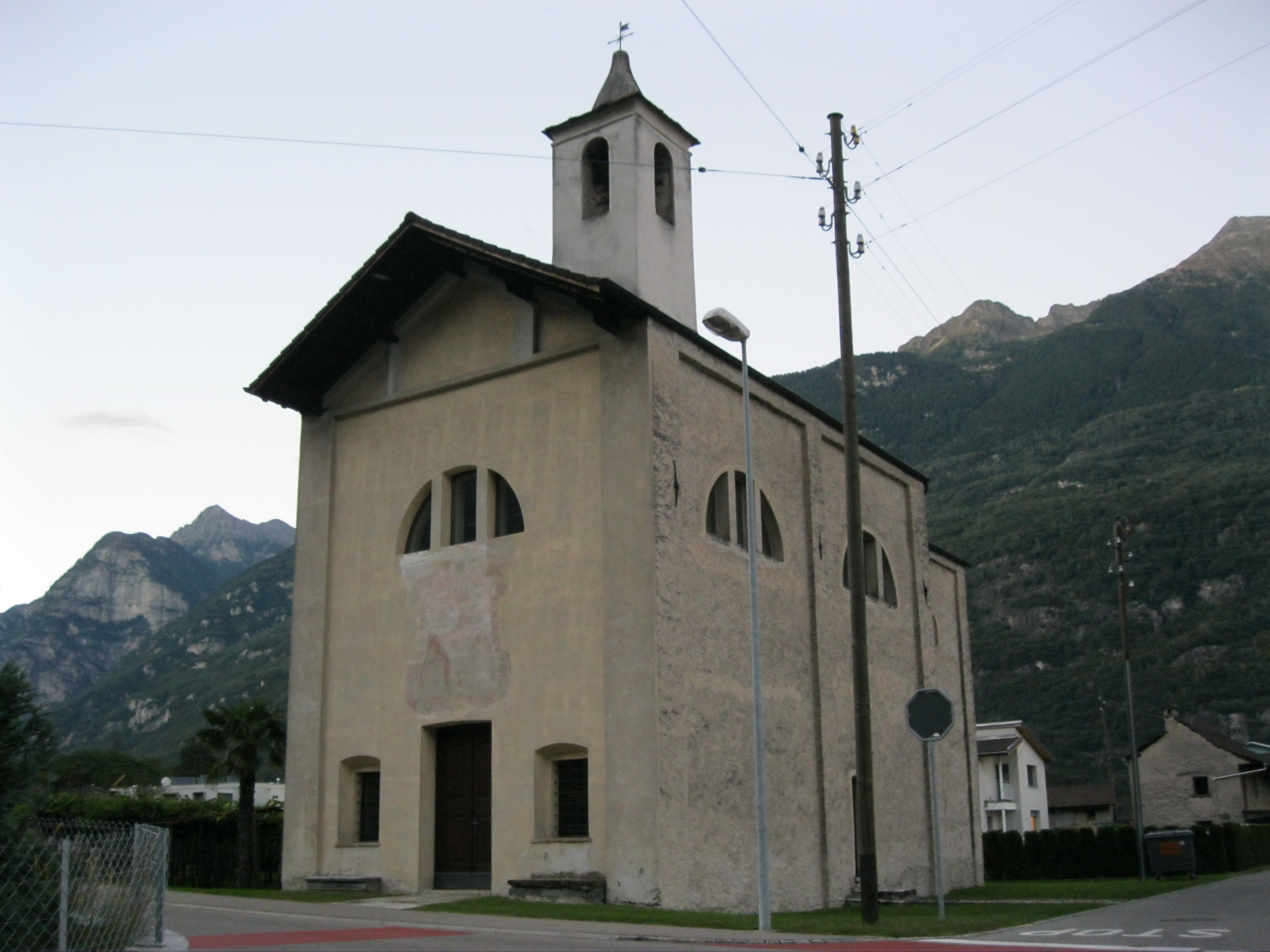 La chiesa della madonna della cintura di Preonzo/TI